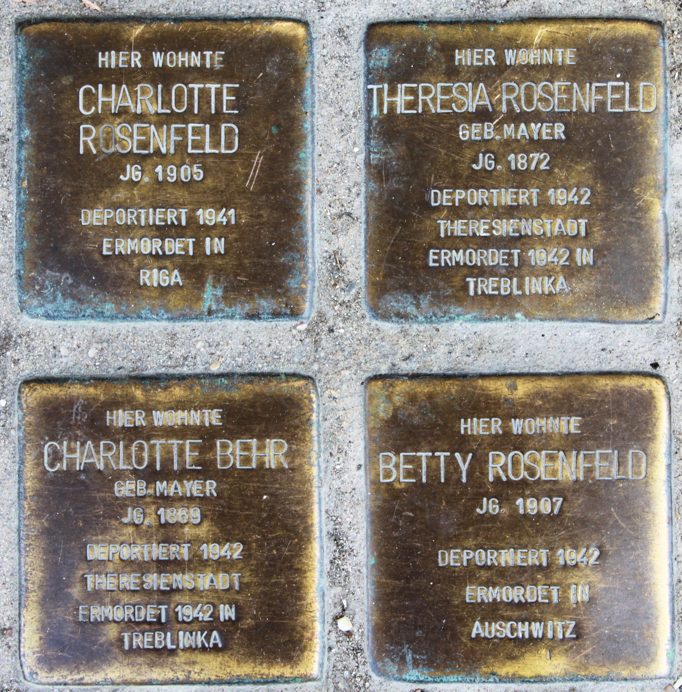 Stolpersteine für Charlotte, Theresia und Betty Rosenfeld sowie Charlotte Behr, Breitscheidstraße 35, Stuttgart Hier wohnteCharlotteRosenfeldJg. 1905Deportiert 1941Ermordet inRiga Hier wohnteTheresia RosenfeldGeb. MayerJg. 1872Deportiert 1942TheresienstadtErmordet 1942 inTreblinka Hier wohnteCharlotte BehrGeb. MayerJg. 1869Deportiert 1942TheresienstadtErmordet 1942 inTreblinka Hier wohnteBetty RosenfeldJg. 1907Deportiert 1942Ermordet inAuschwitz